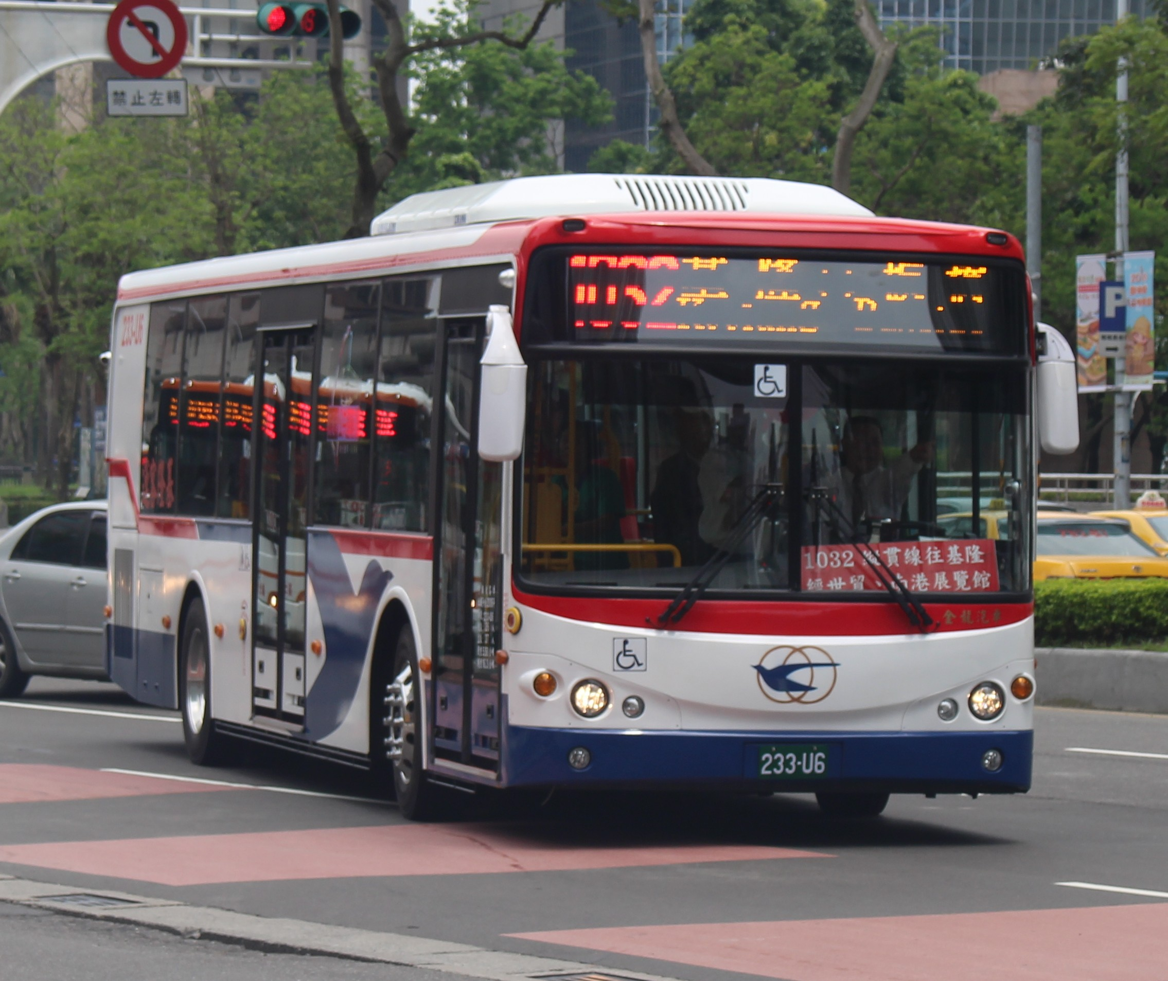 基隆客運 2016 KINGLONG KL6112U1 233-U6 1032